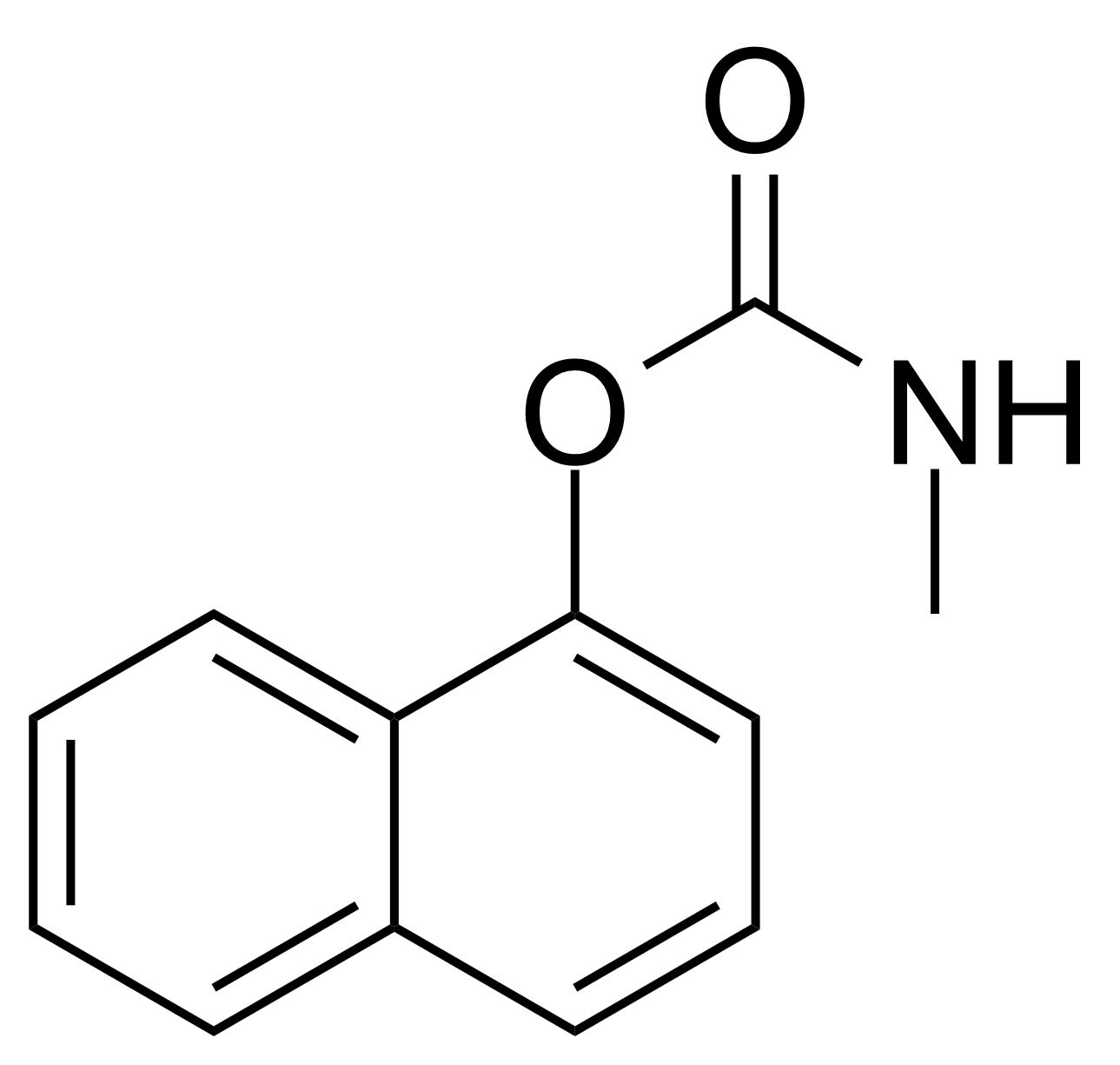 Carbaryl pesticide